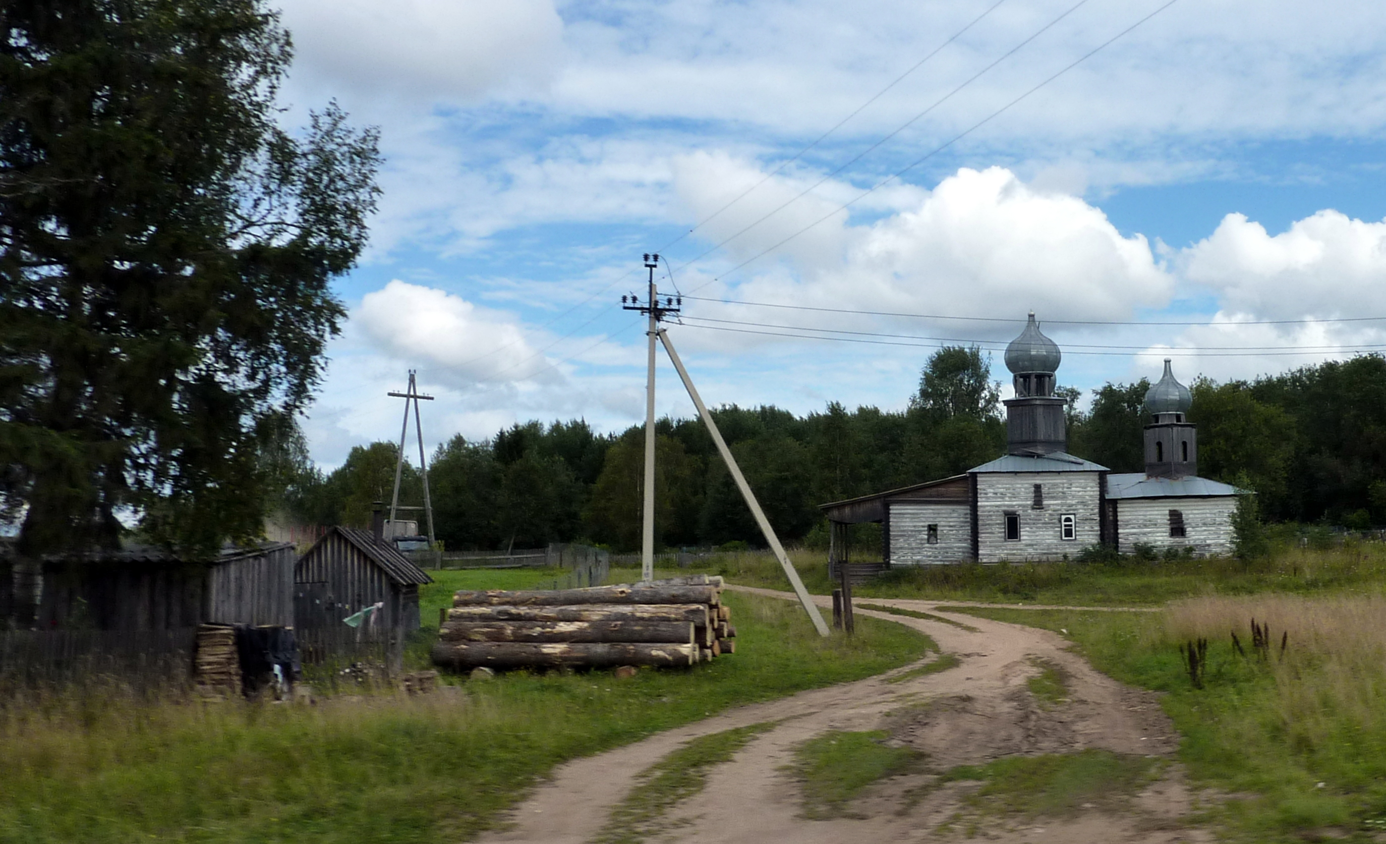 церковь Успенская (деревянная) в селе Девятины Вытегорского района Вологодской области. Это новая церковь. На момент съемки она ещё строилась. Старая церковь, 1770 года постройки, к сожалению, сгорела...